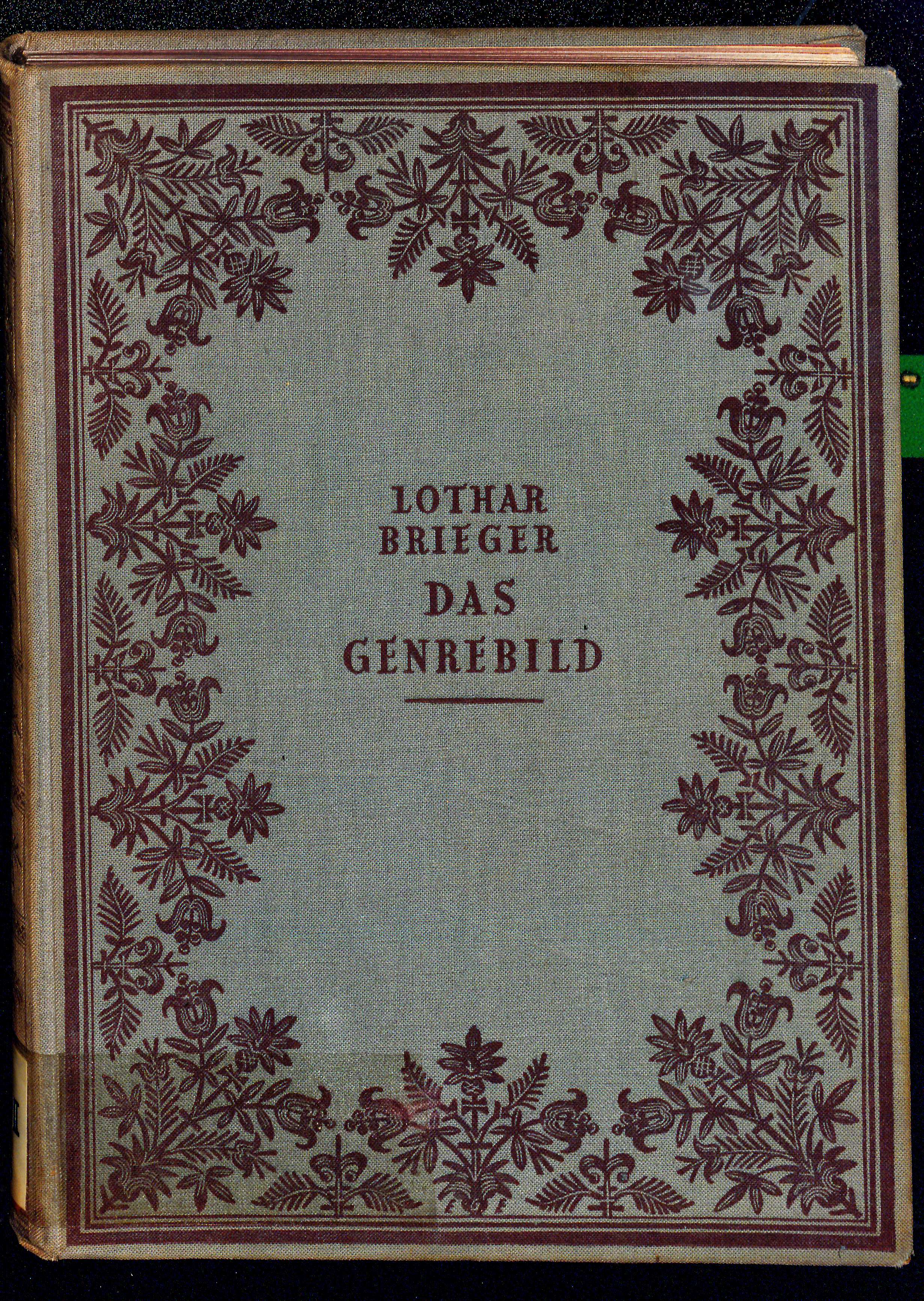 Lothar Brieger Das Genrebild : Eine Entwicklung der bürgerlichen Malerei . München : Delphin-Verlag, 1922